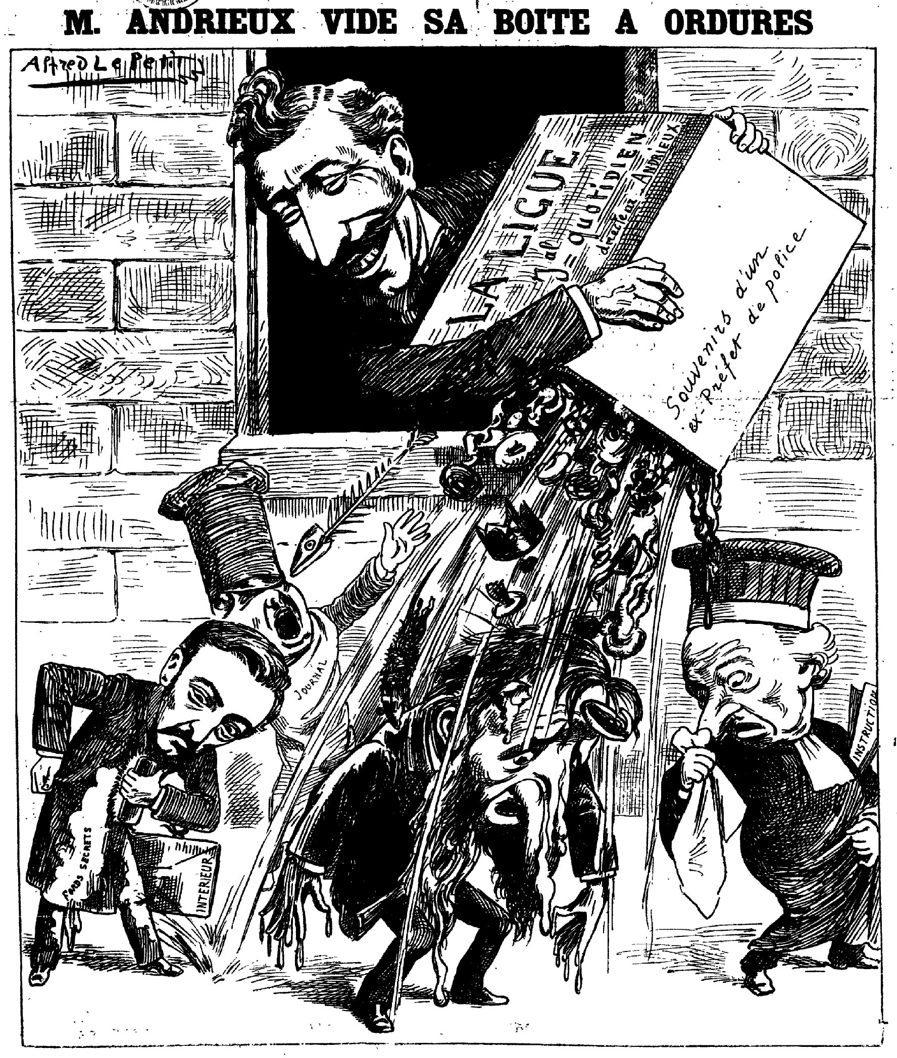 "M. Andrieux vide sa boîte à ordures".